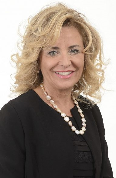 Foto di Mariella Muraloni, Capitano reggente di San Marino